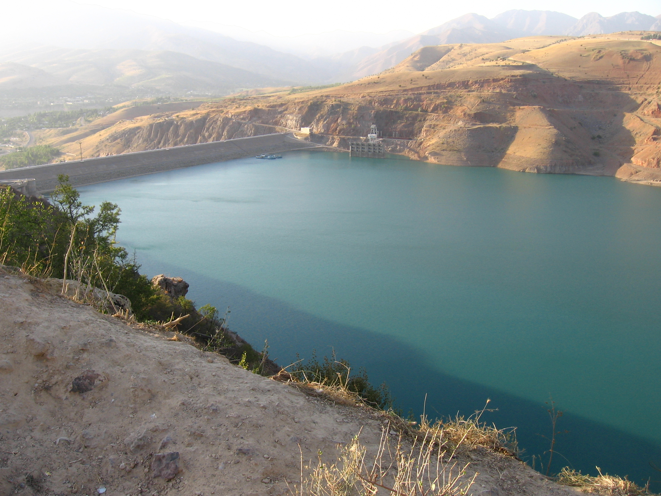 Charvak dam